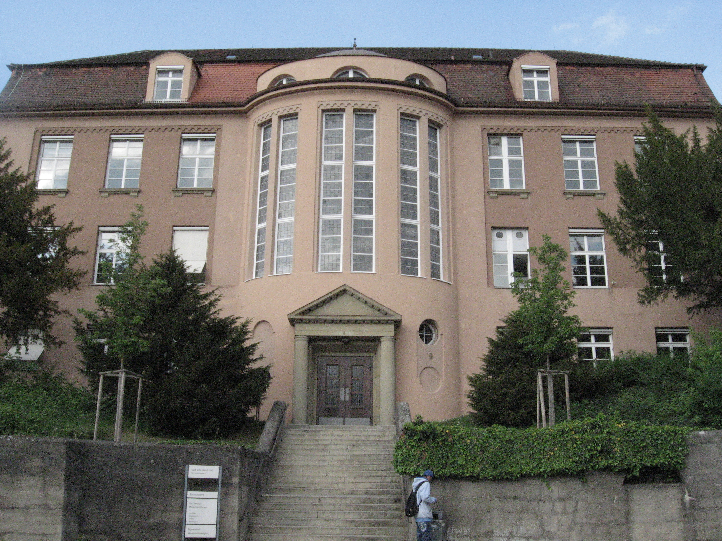 Blick aus der Gymnasiumsstraße nach NE auf die frühere Handelsschule von Schwäbisch Hall. Das Gebäude dient heute der Verwaltung (Bauamt u.ä.).